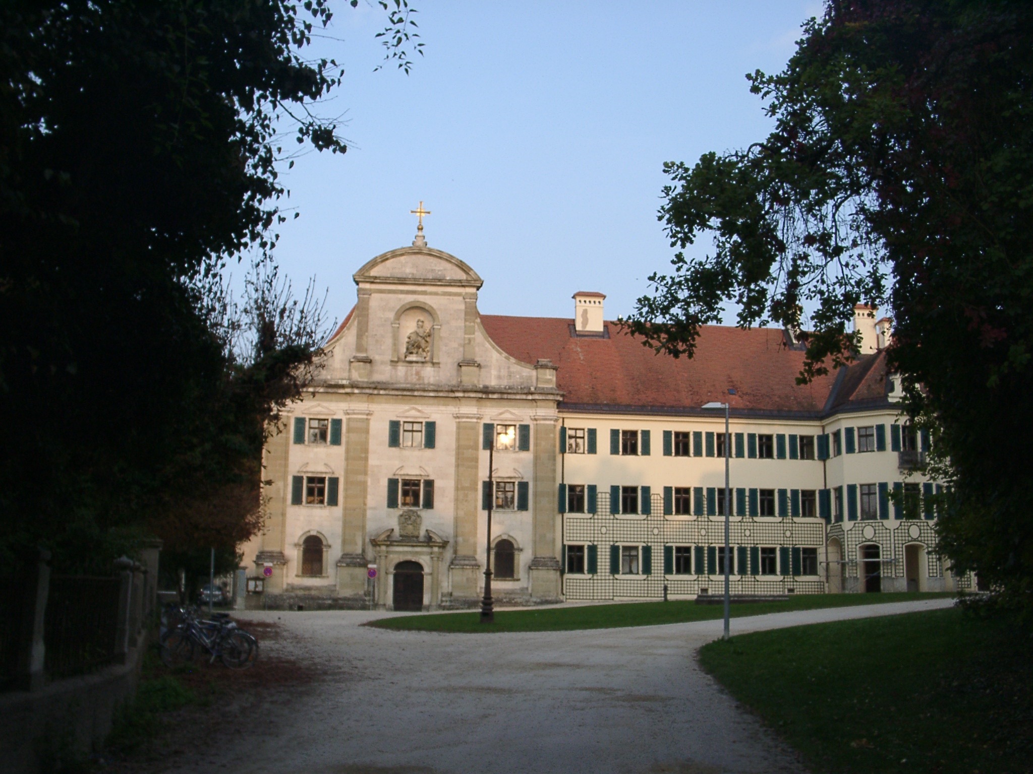 Prüfening